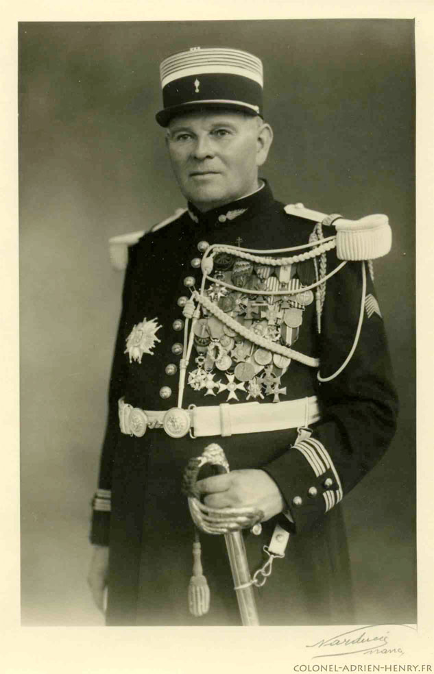 Photo du Colonel Adrien Henry en uniforme avec ses décorations de guerre.